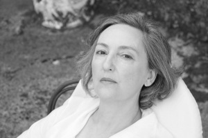 Menchu Gutierrez